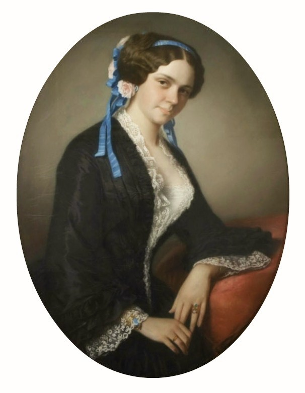 Вердеревская Мария Васильевна (по первому браку Шиловская, по второму — Бегичева) (1825—1879) — салонная певица-любительница.